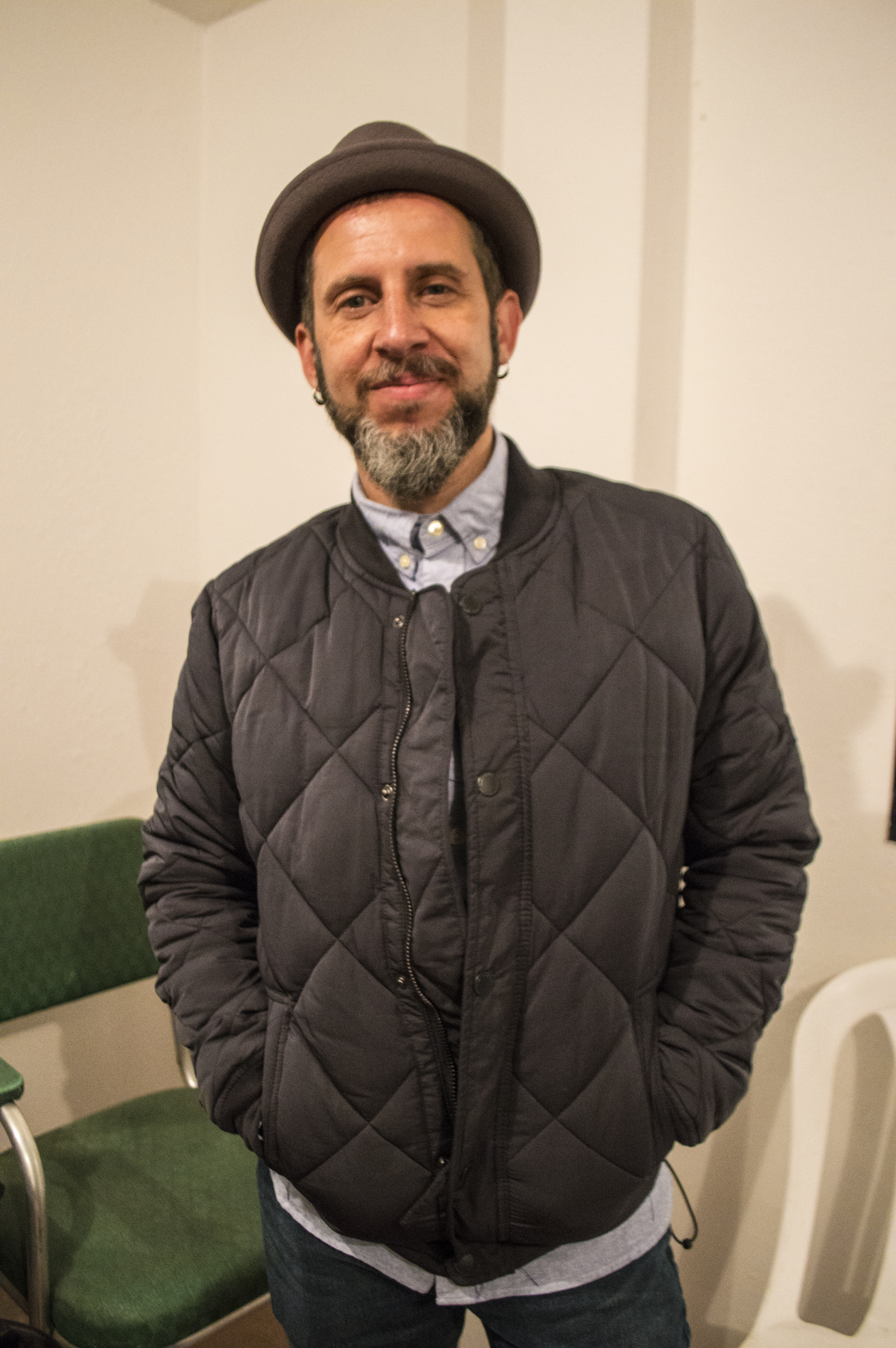 ESTA IMAGEN ES DE MI PROPIEDAD Y LA DEJO A DOMINIO PÚBLICO PARA QUE SEA USADA POR WIKIPEDIA Y QUIEN DESEE USARLA, ACLARO EN LA DESCRIPCIÓN DE LA MISMA PORQUE LAMENTABLEMENTE SE ME HA BORRADO GRAN PARTE DE MI TRABAJO SUBIDO EN ESTA PLATAFORMA PENSANDO QUE NO SOY YO QUIEN HACE LAS FOTOGRAFÍAS.